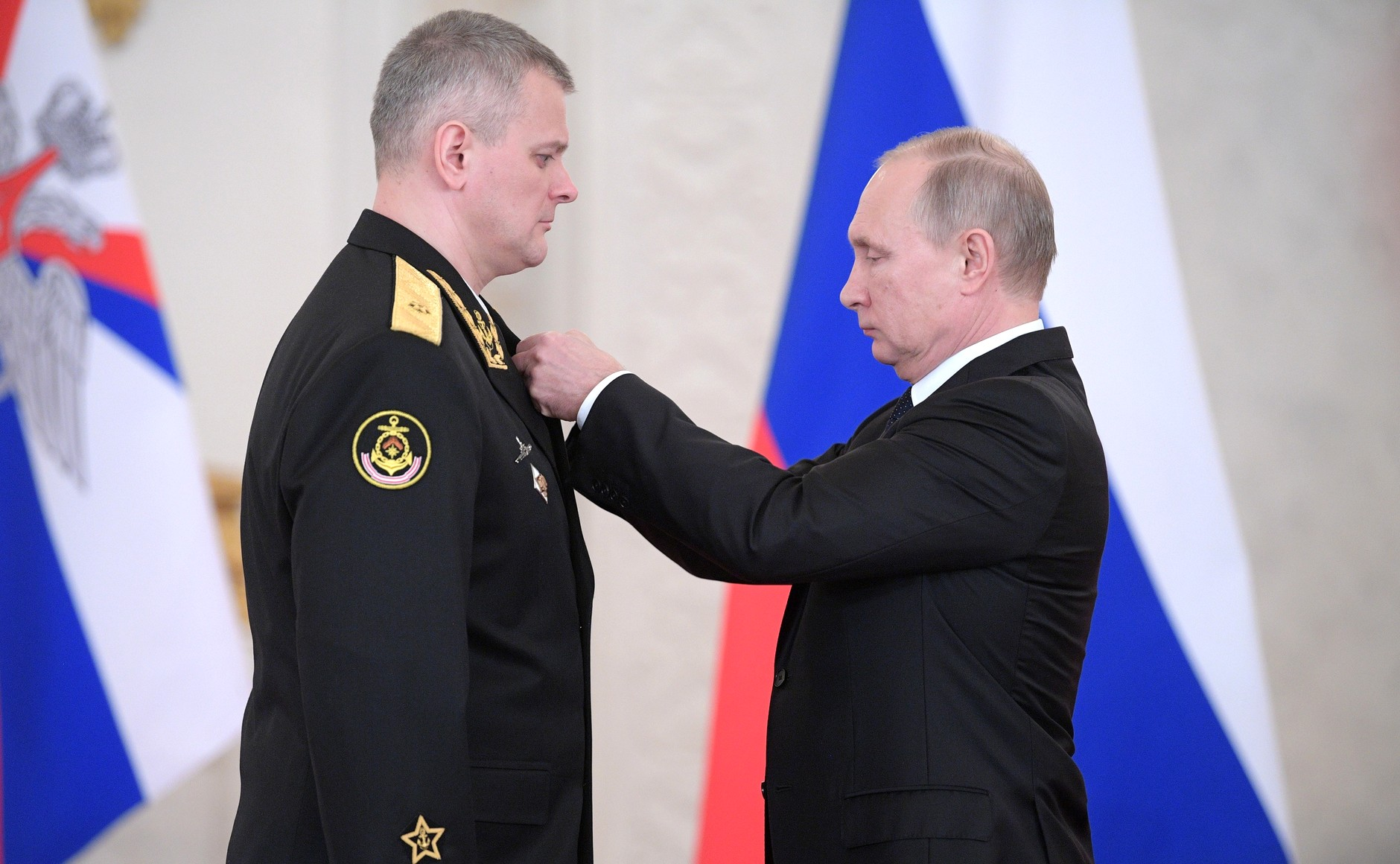 Встреча Президента России Владимира Путина с военнослужащими, участвовавшими в антитеррористической операции в Сирии. Контр-адмиралу Валерию Варфоломееву присвоено звание Героя Российской Федерации.